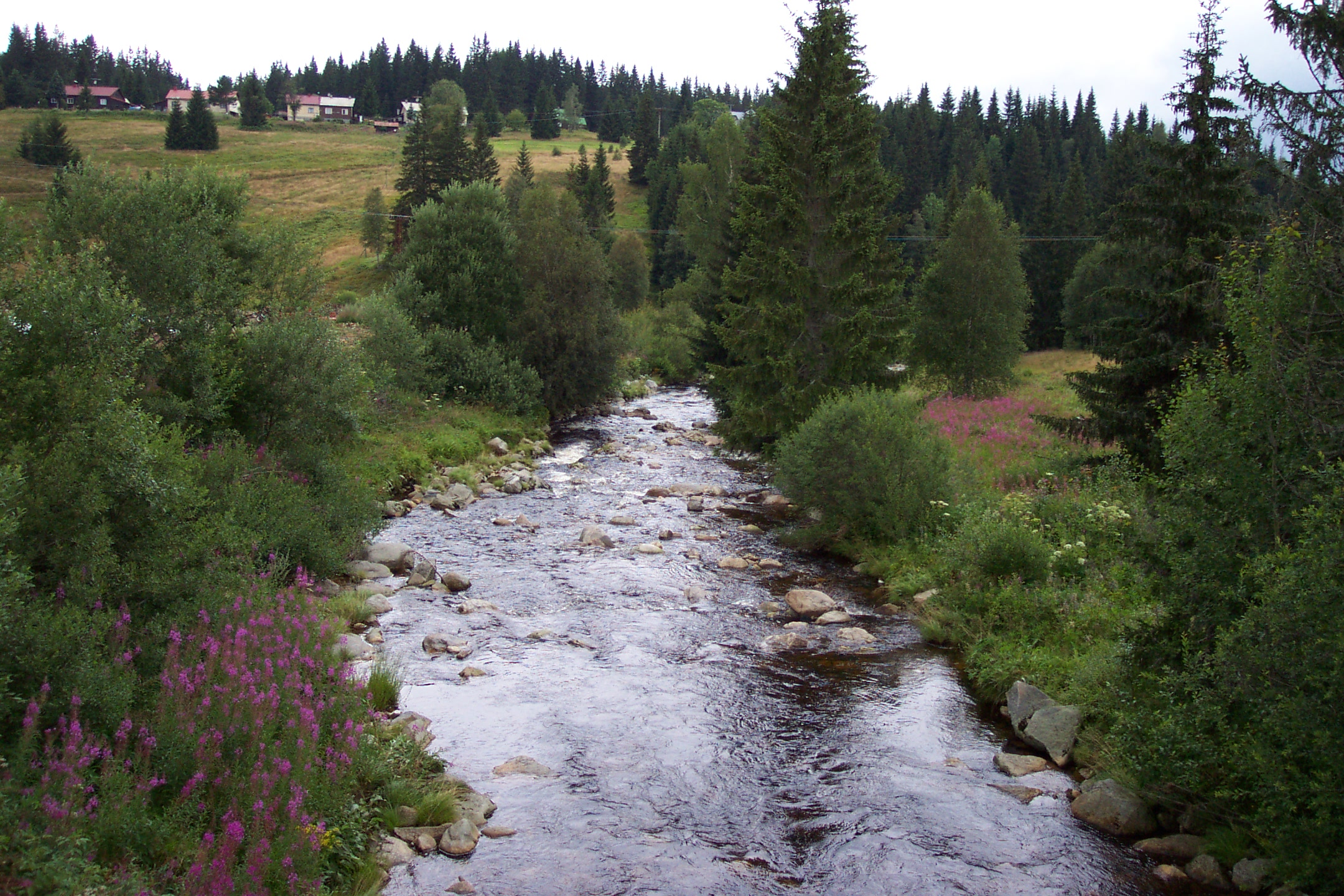 Šumava, Czech republic, River in Modrava village - Šumava, řeka na Modravě